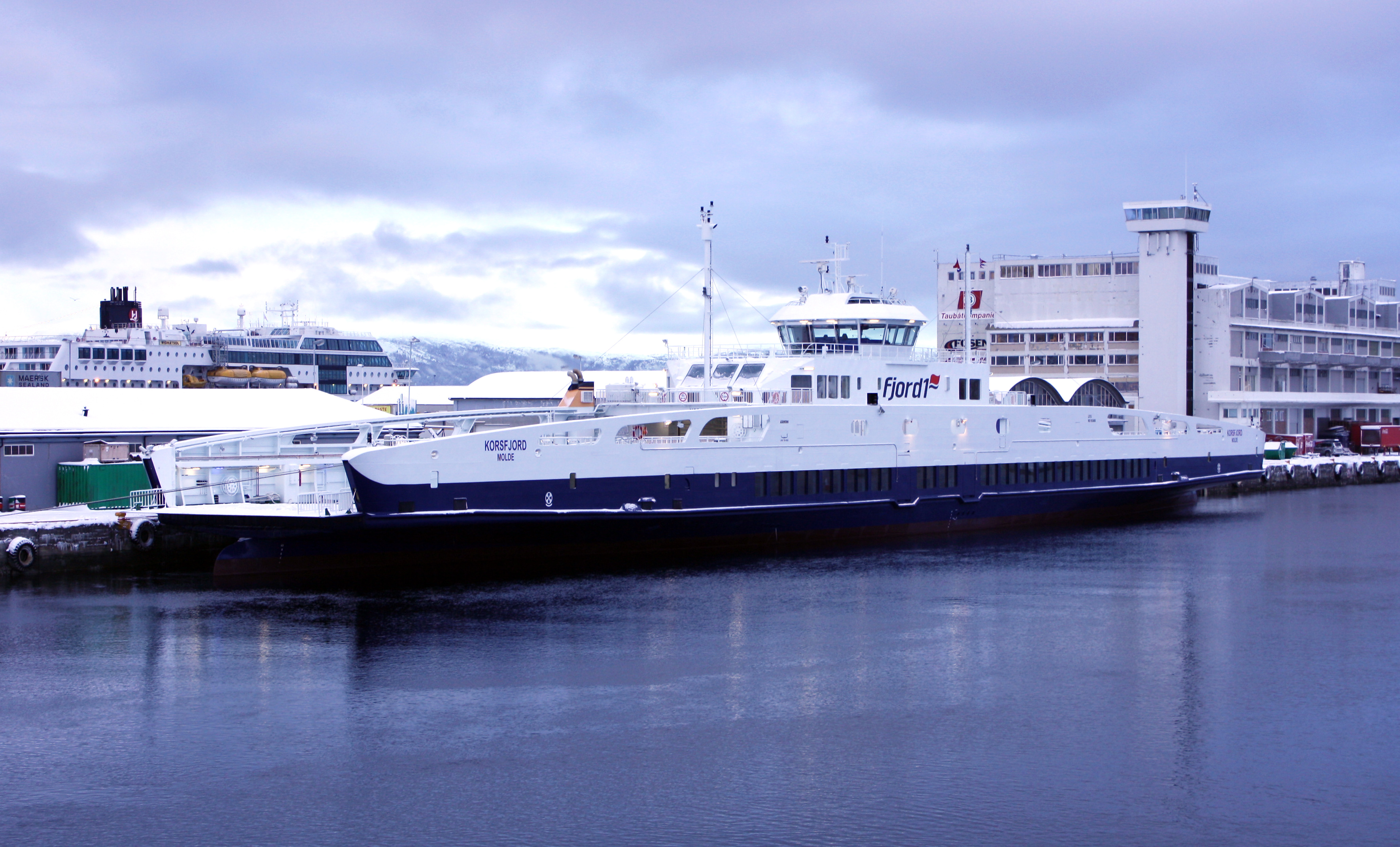 Den nye gassferja MF Korsfjord, som skal frekventere strekningen Flakk–Rørvik fra 1. januar 2010 ankom Trondheim for første gang den 8. desember 2010.